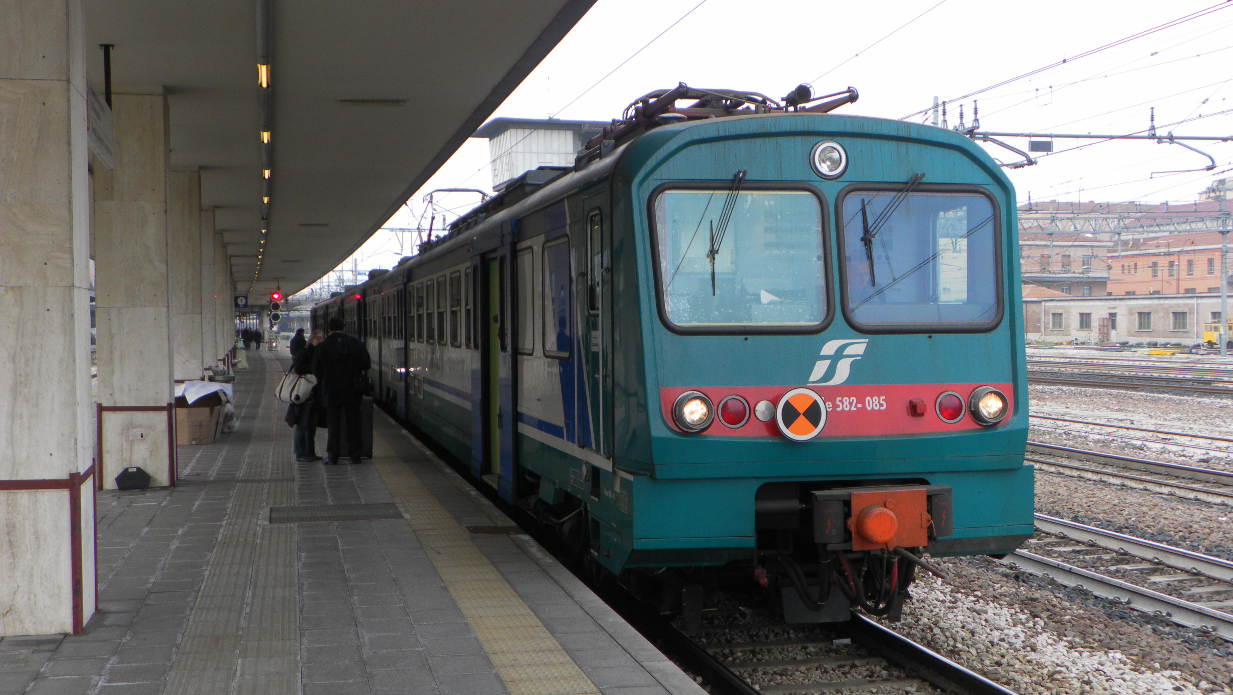 ALe 582 costruita dalle Officine Meccaniche della Stanga alla Stazione di Bologna Centrale